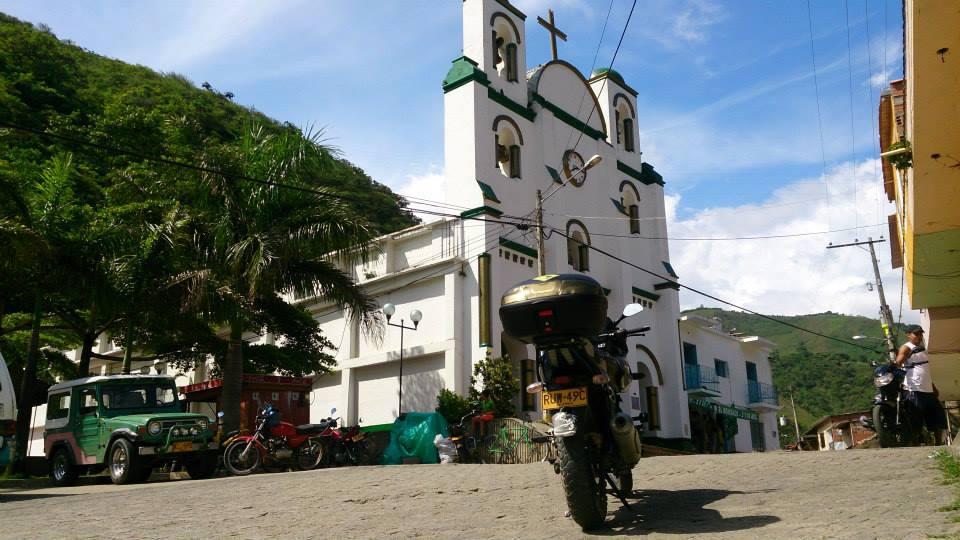 Esta fotografía fue tomada en el municipio colombiano con código 05842.